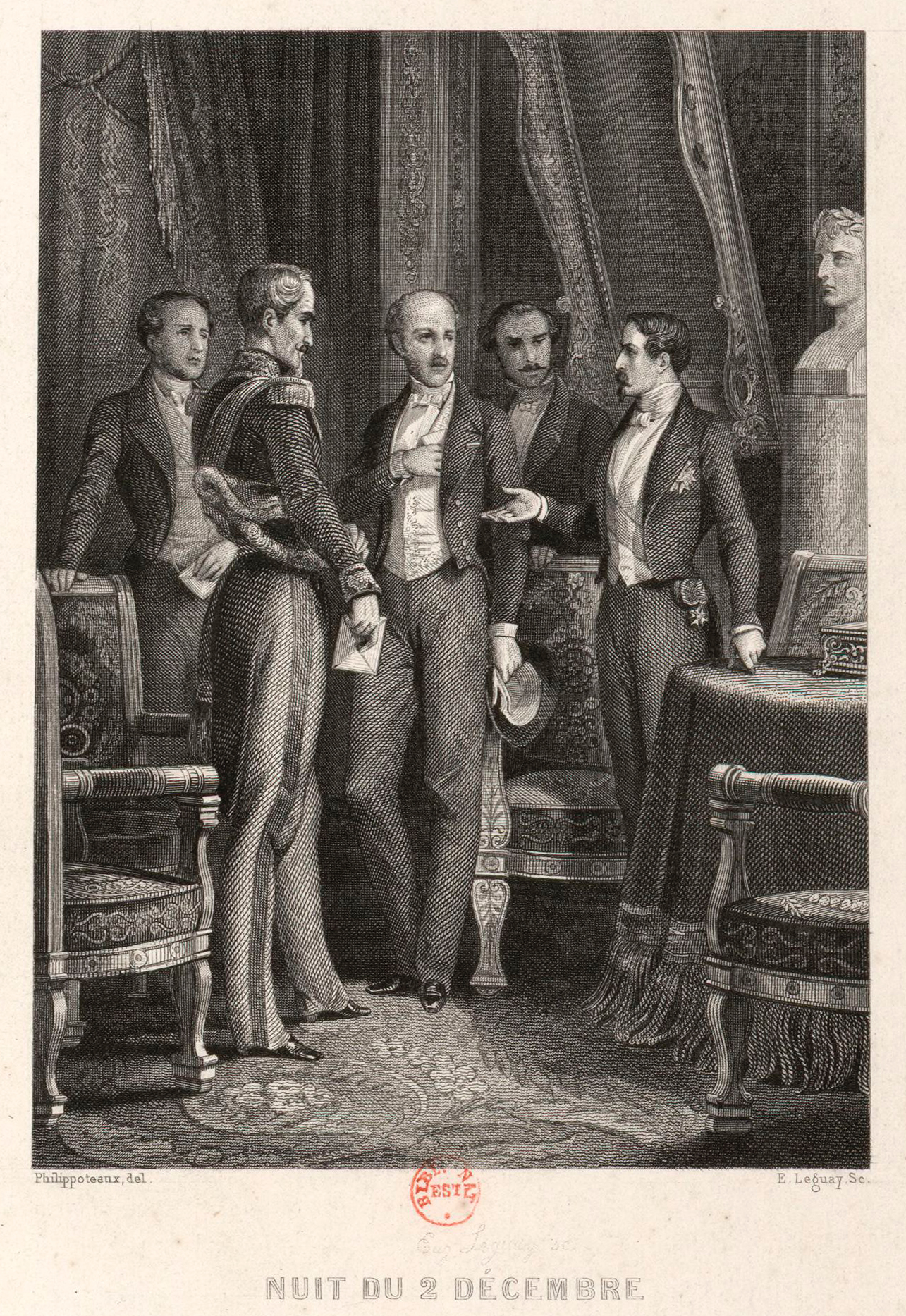 Nuit du 2 Décembre. Devant un buste tutélaire de l'empereur Napoléon Ier, le président Louis-Napoléon Bonaparte (à droite) délivre ses instructions aux conjurés du Coup d'État lors de la nuit du 1er au 2 décembre 1851. De gauche à droite : son secrétaire Jean-François Mocquard tient la liste des personnes à arrêter, le général de Saint-Arnaud tient les ordres militaires destinés au maréchal Magnan, Charles de Morny (par ailleurs demi-frère du président) glisse dans sa poche le décret le nommant ministre de l'Intérieur tandis que Victor de Persigny se tient fidèlement en retrait. [1] Estampe dessinée par Philippoteaux et gravée par E. Leguay, extraite de l'ouvrage de Paul Lacroix, Histoire politique, anecdotique et populaire de Napoléon III, empereur des Français, et de la dynastie napoléonienne, vol. 4, Paris, Dufour, Mulat et Boulanger, 1853. Nicole Villa, Denise Dommel et Jacques Thirion, Collection De Vinck : inventaire analytique. Un siècle d'histoire de France par l'estampe, 1770-1871, tome 7 : La Révolution de 1848 et la Deuxième République, Bibliothèque nationale, Département des estampes, 1955, p. 768, lire en ligne.